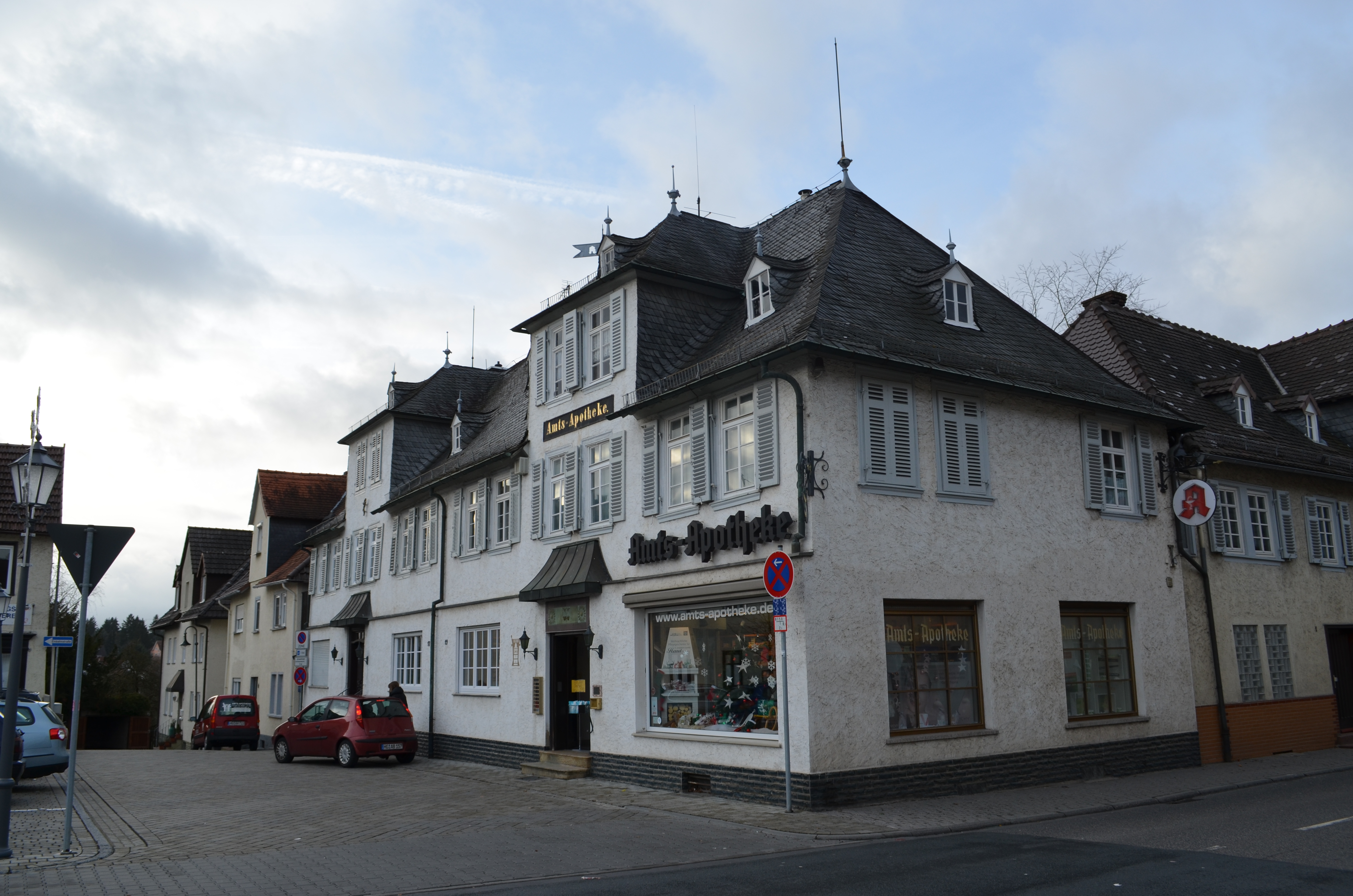 Usingen, Marktplatz 19, Ecke